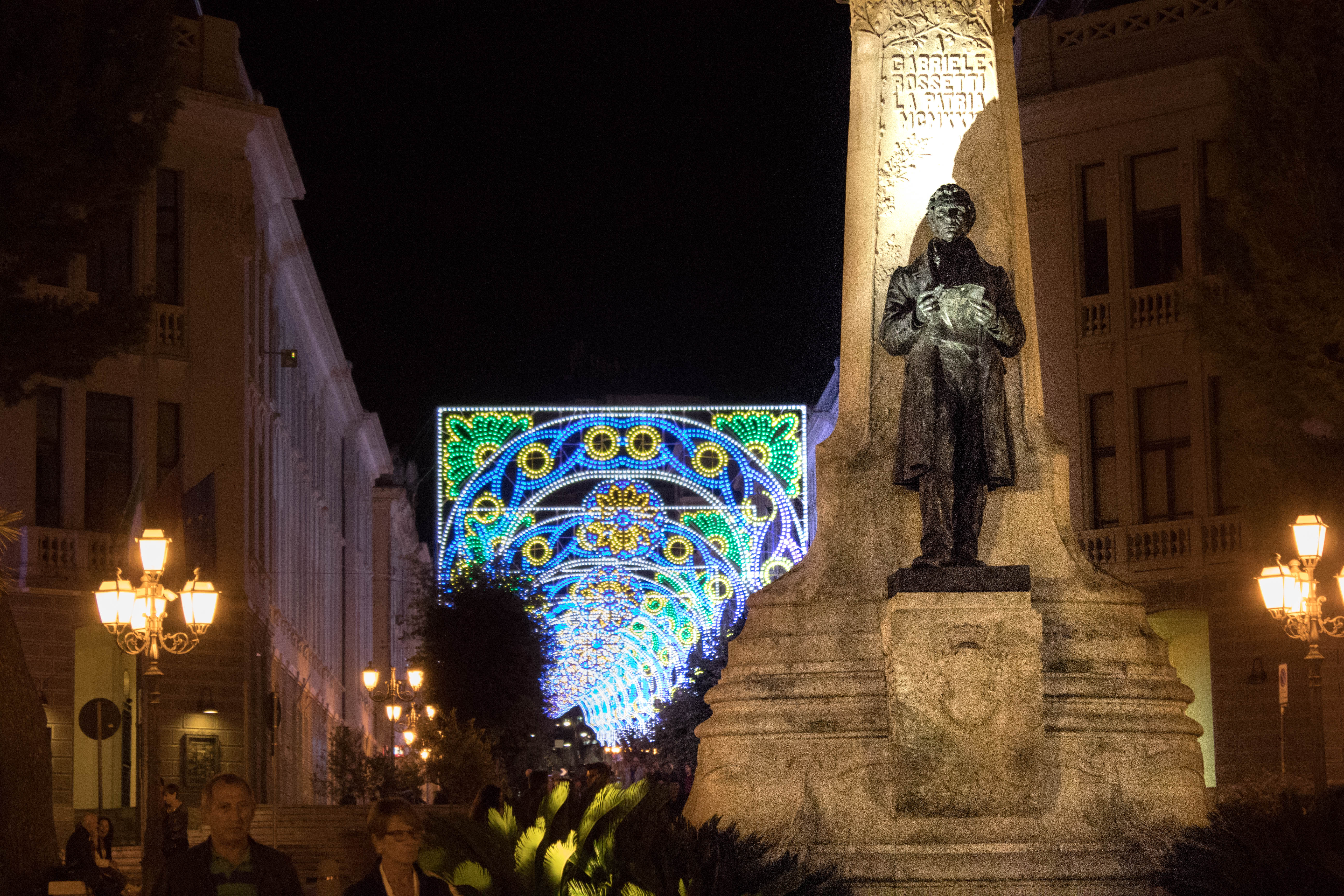 Monumento a Gabriele Rossetti This is a photo of a monument which is part of cultural heritage of Italy.